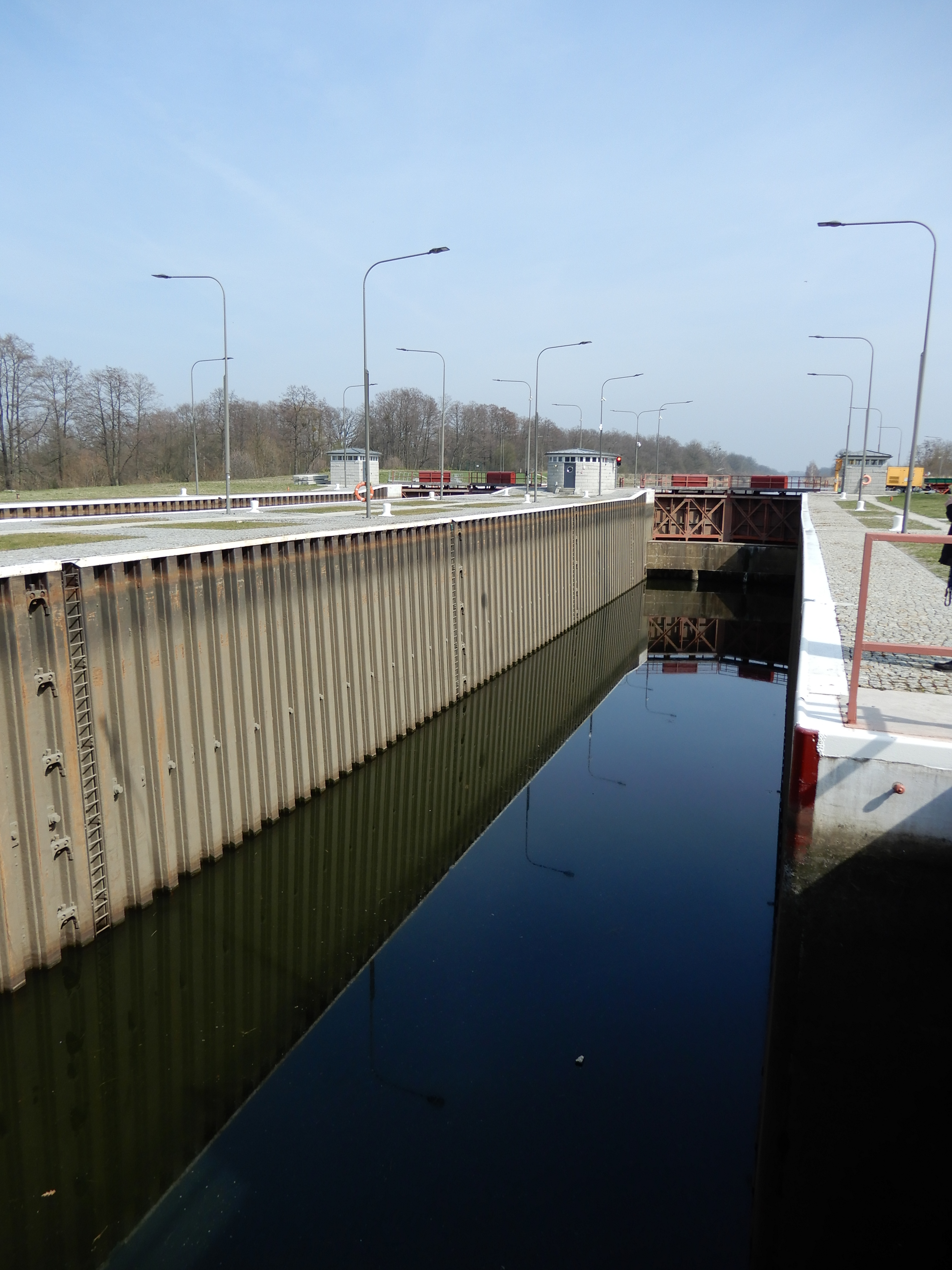 Śluza Rudzienic, śluza nr IV zlokalizowana na 21,5. km Kanału Gliwickiego, wybudowana w latach 1936-1938.